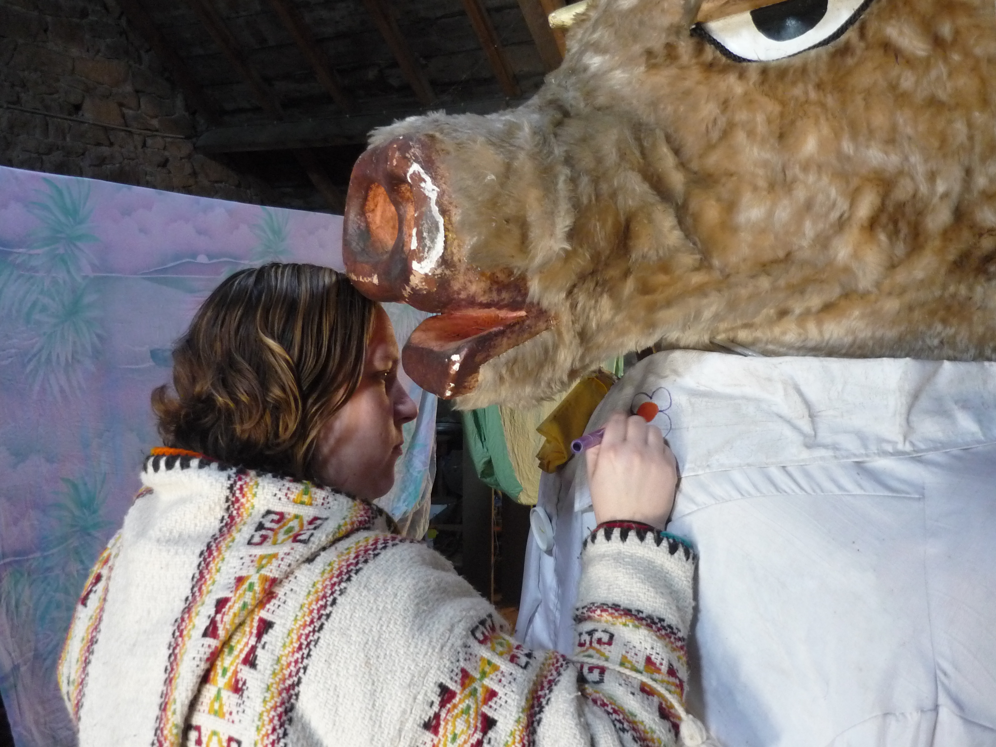 Alexandra Bristiel restaurant le Géant-Bœuf du Carnaval de Paris peu avant sa dernière sortie le 22 février 2009 au Carnaval de Paris.